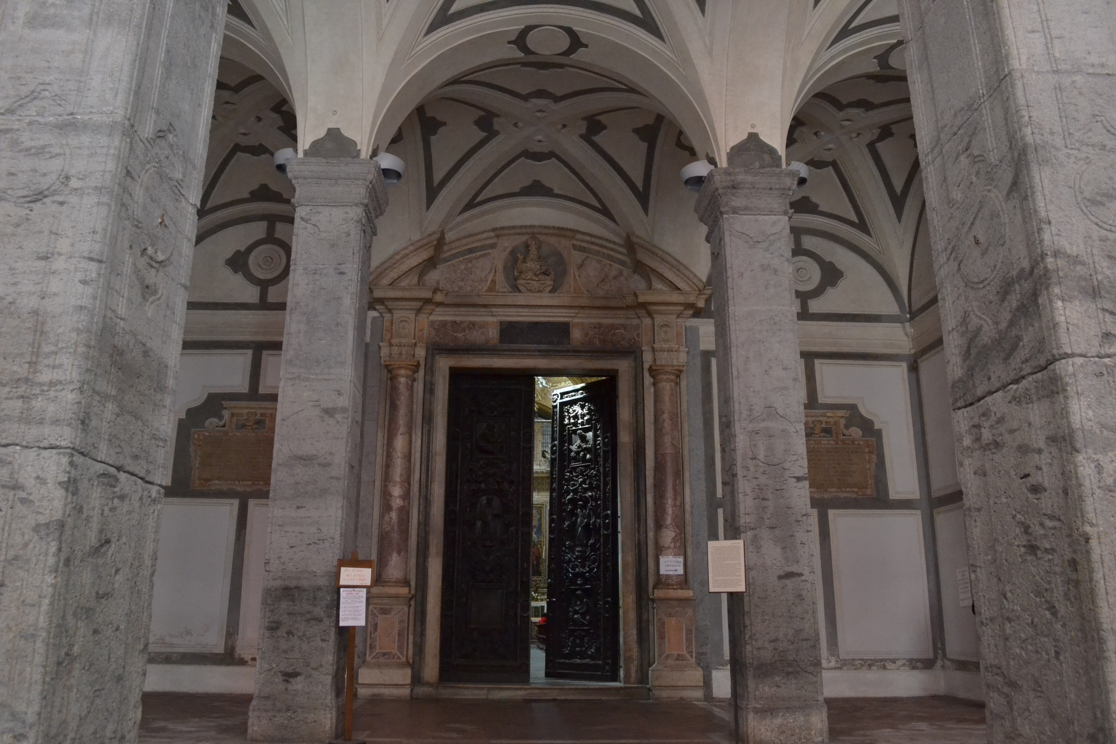 Portale d'ingresso della chiesa di San Gregorio Armeno di Napoli